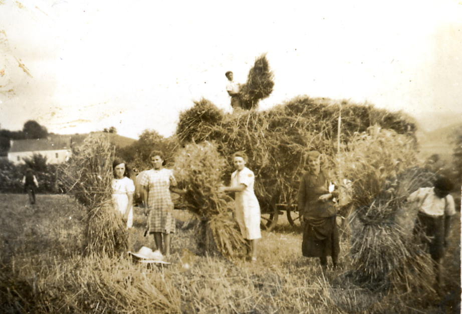 Photographie prise en juillet 1940 par Victorine Darré. Elle montre une scène de récolte de gerbes de blé prise dans l'ancien champ de Candaouan (Borie) de Bourréac (Canton de Lourdes-Est) occupé aujourd'hui par les maisons Fialho et Worgague. De gauche à droite Maryse Darré, Madeleine Nadau, Gertrude Azens et Marie Noguez (dite Marie de Lahaille). La photo avait été prise pour être envoyée à Jean Darré, alors qu'il était prisonnier dans un camp à Verdun (avant qu'il ne s'en évade ce qui lui permit d'échapper à un transfert en Allemagne). Prise dans un contexte dramatique (après la mort d'Amédée Ladebèze, père de Victorine, en juin 1940 et après le choc de la défaite de 1940), la photographie témoigne de la solidarité locale et du travail des femmes en l'absence des hommes prisonniers.